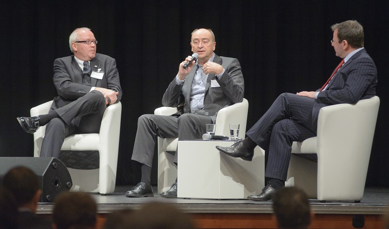 NRW-Bewerbung „Schaufensterregion für Elektromobilität“ 15.12.2011 Schaufenster Elektromobilität Flickr tags: Schaufenster Elektromobilität; Düsseldorf; Maritim Hotel; EnergieAgentur.NRW; Bewerbung; Klimaschutz; EANRW; NRW; Elektromobilität; Route der Elektromobilität; Energiewende; Klimawandel; Johannes Remmel; Svenja Schulze